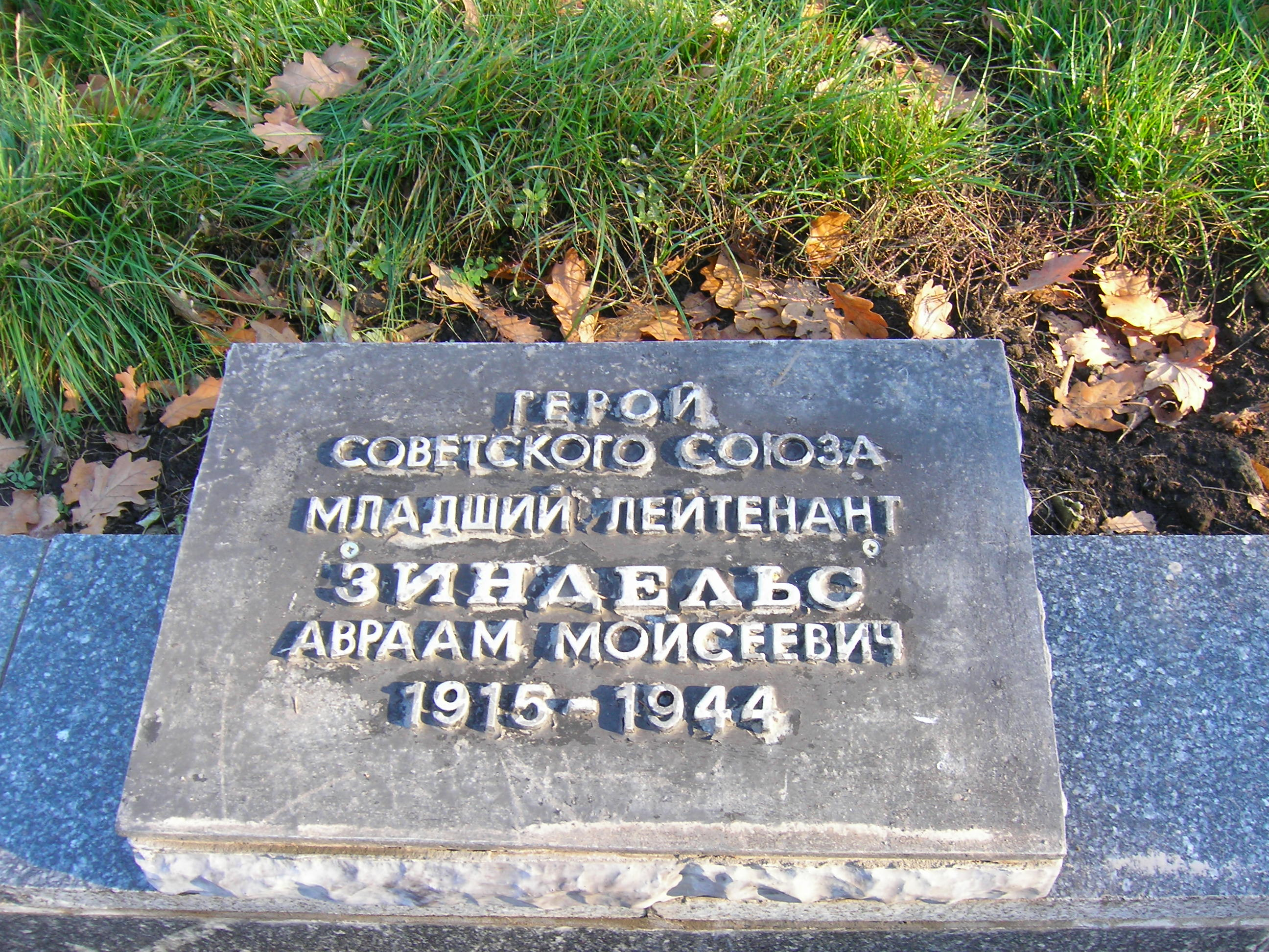 м. Липовець. Меморіальна плита пам'яті героя - уродженця Липовця